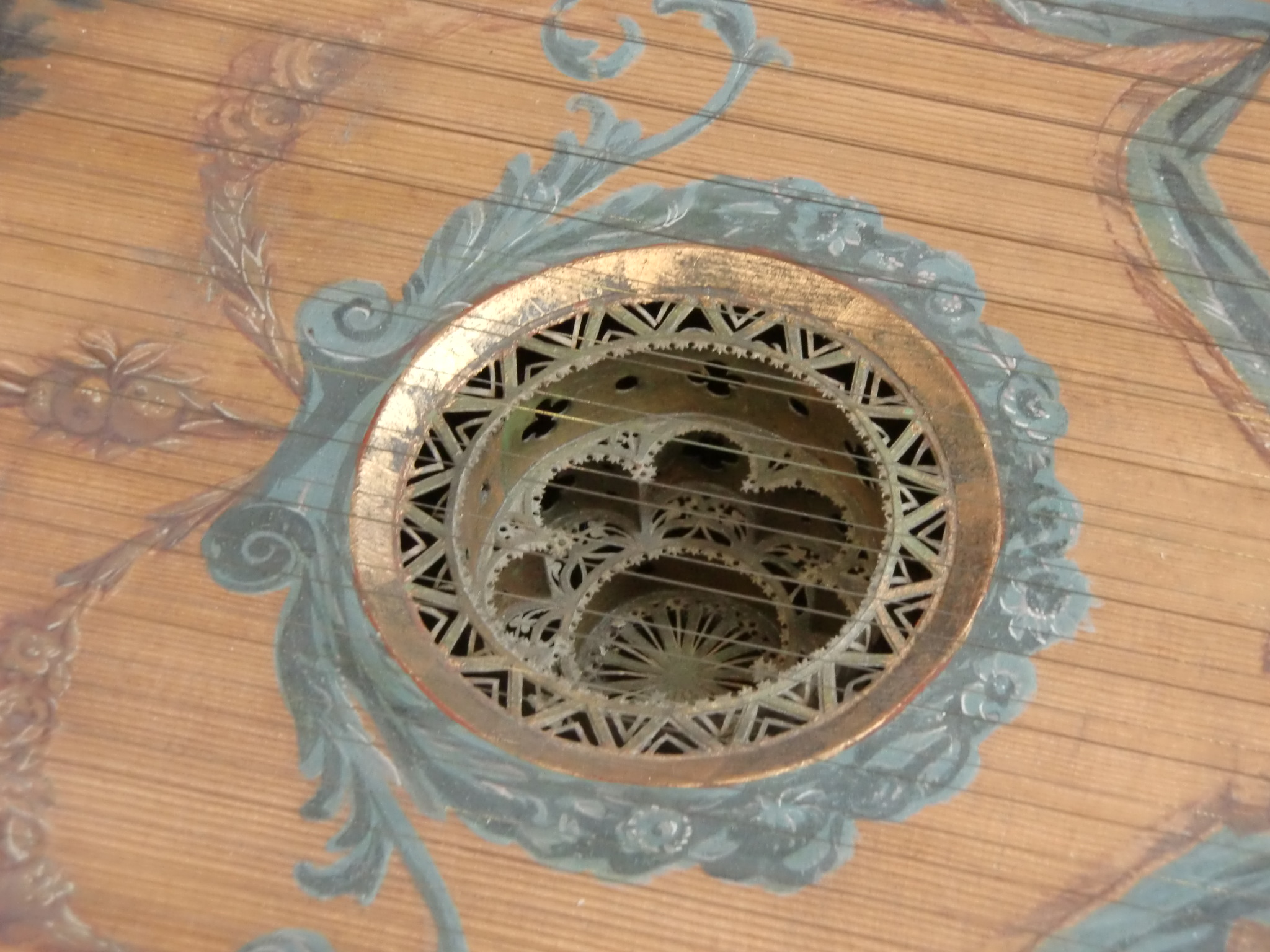 Rosace du clavecin de Johann Conrad Fleischer (Hambourg 1710) - Berlin, Musikinstrumentenmuseum